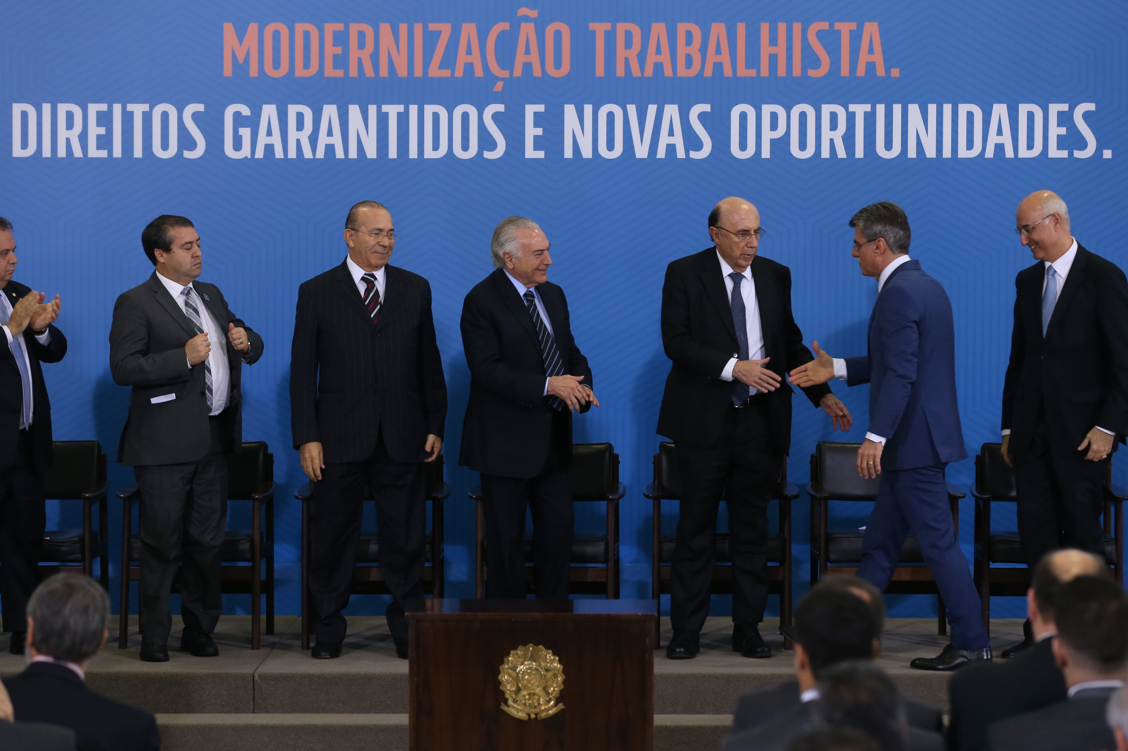 Português do Brasil: Brasilia - O presidente Michel Temer, junto a ministros e parlamentares fazem um pronunciamento após a aprovação da Reforma Trabalhista.